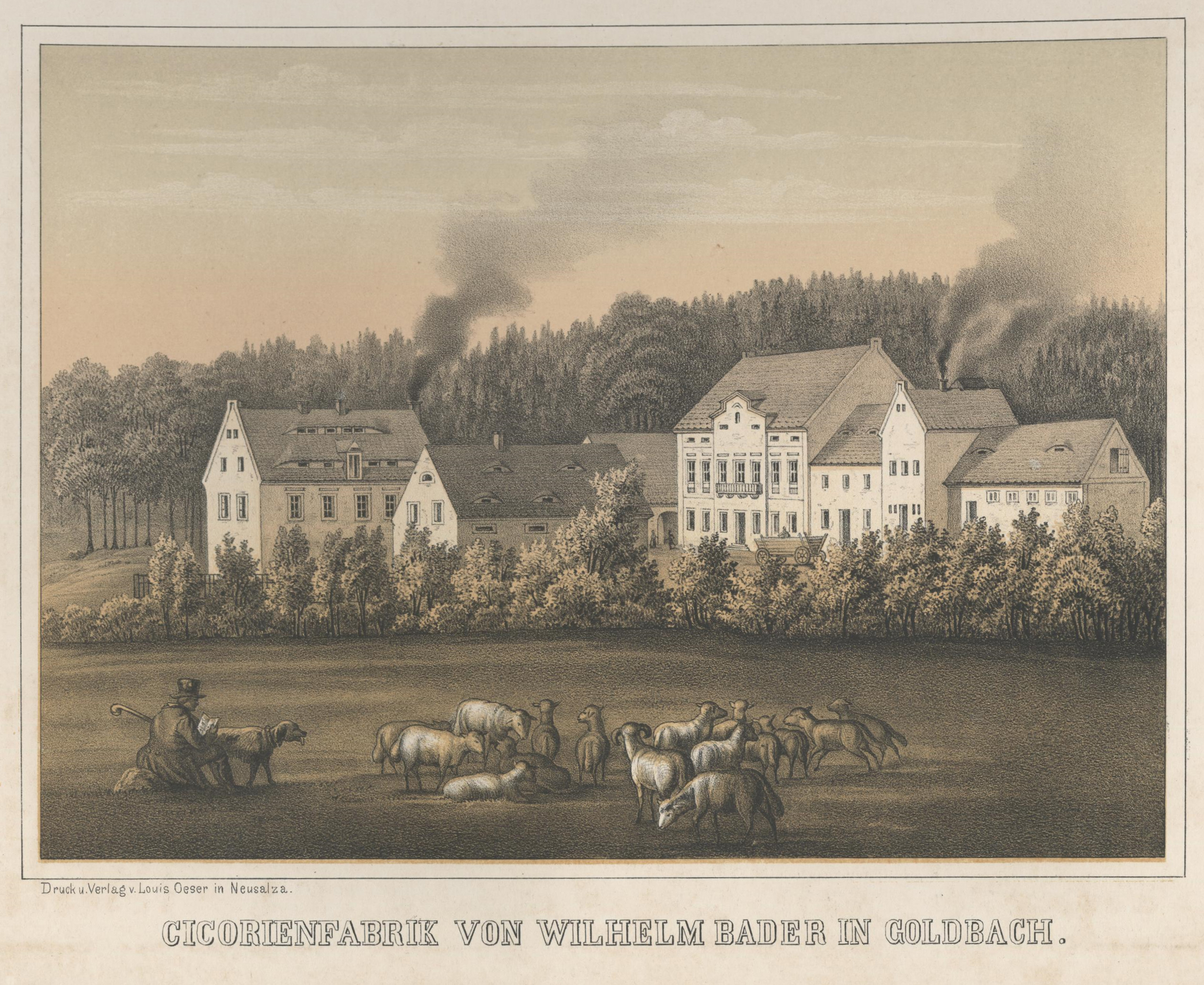 Cicorienfabrik von Wilhelm Bader in Goldbach aus: Album der Sächsischen Industrie Erster Band